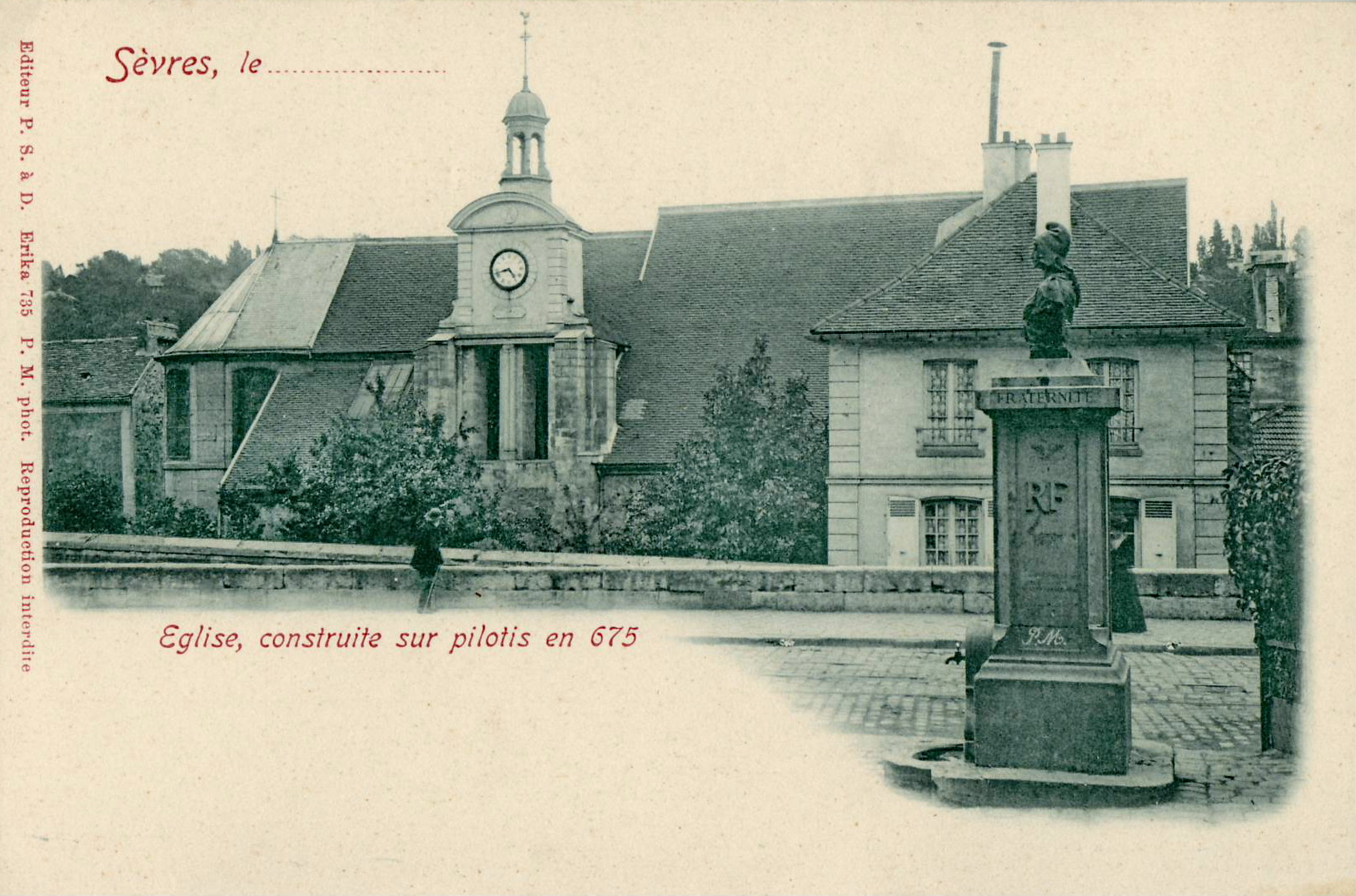 Carte postale ancienne, éditée par P. S. à D. Erika, P. M. Phot n°735 :Sèvres : Eglise, construite sur pilotis en 675Il s'agit de l'Eglise Paroissiale Saint Romain-de-Blaye